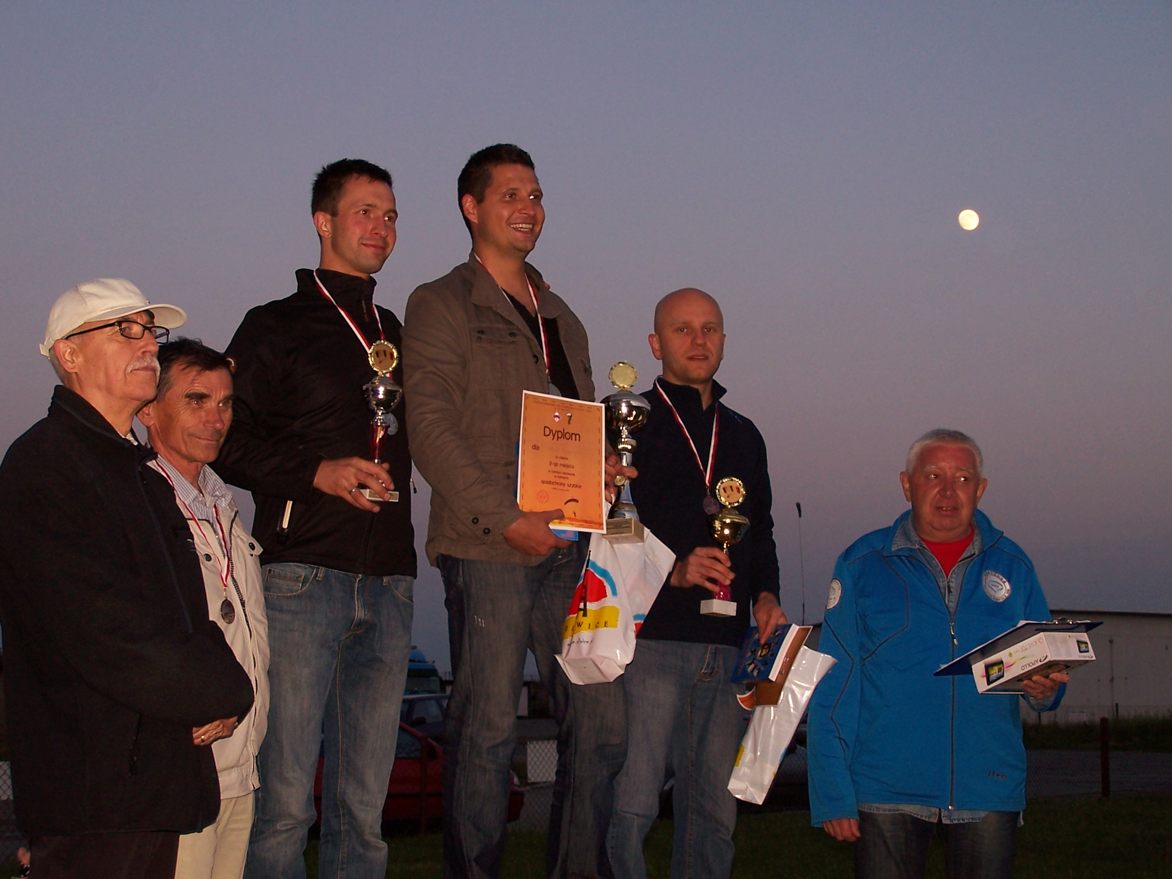 Spadochronowe Mistrzostwa Śląska 2012. Klasyfikacja celność lądowania (spadochrony szybkie): I miejsce - Tymoteusz Tabor, II miejsce - Jerzy Wojtas, III miejsce - Bartłomiej Ryś — Sekcja Spadochronowa Aeroklubu Gliwickiego. Pierwszy z lewej Marian Brytan Prezes VII Oddziału Związku Polskich Spadochroniarzy, drugi Jan Isielenis Przewodniczący Koła przy Aeroklubie Gliwickim VII Oddziału Związku Polskich Spadochroniarzy. Pierwszy z prawej: Ryszard Koczorowski Sędzia Główny Mistrzostw